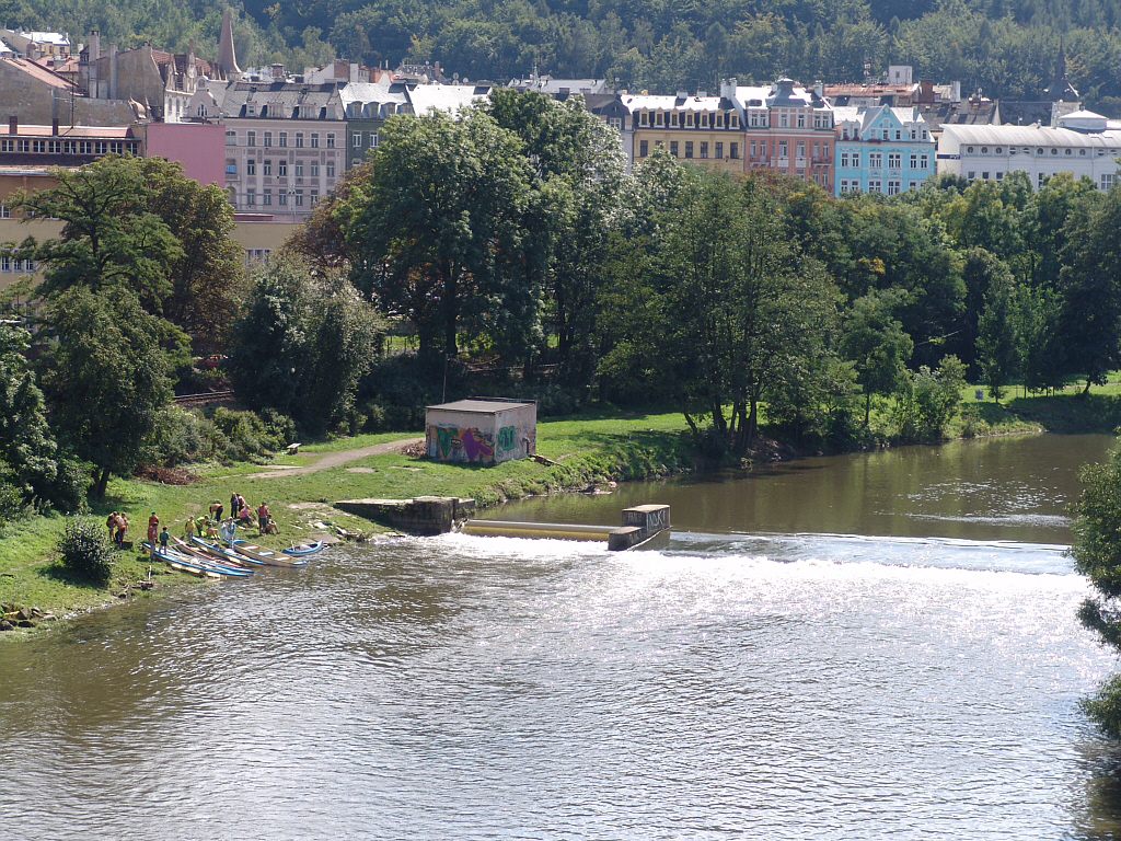 Der Fluss Eger in Karlsbad (Karlovy Vary).(2005) Fotograf: Walter J. Pilsak, Waldsassen Copyright Status: GNU Freie Dokumentationslizenz